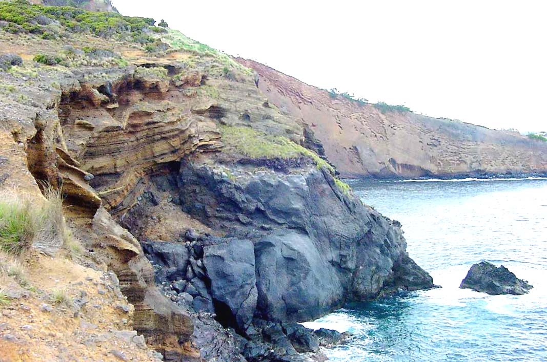 Ponta das Contendas, ilha Terceira, Açores, Portugal.